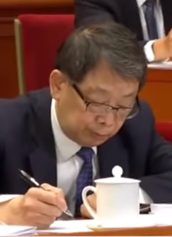 中央政治局委员陈希在十三届全国人大三次会议上，2020年5月22日。